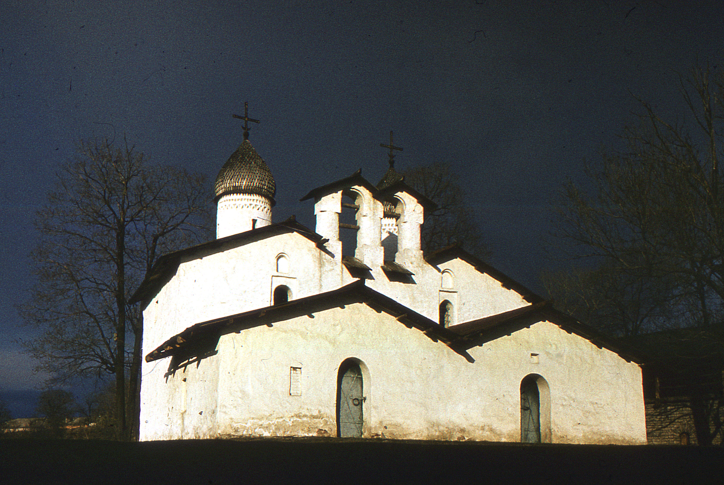 Церковь Покрова и Рождества